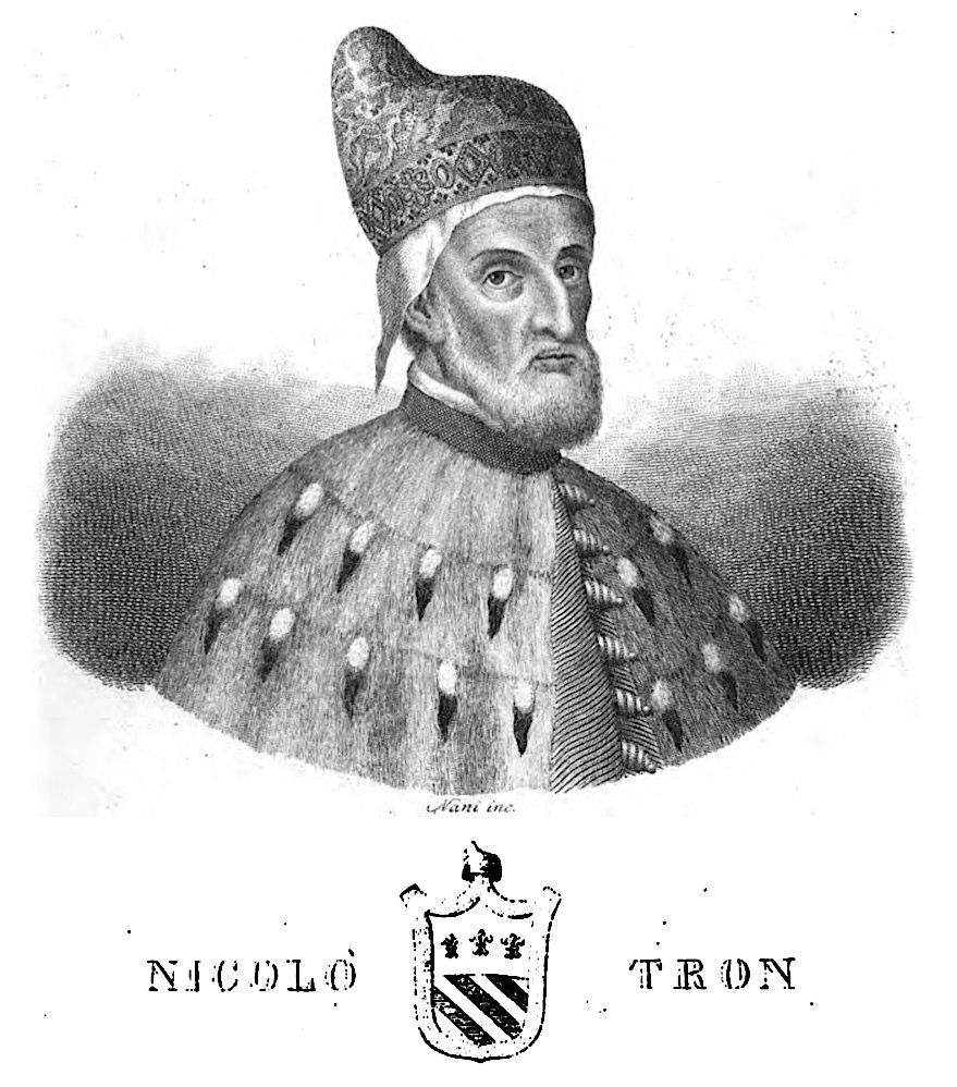 Nicolo' Tron 1471-1473 (Nicolaus Tronus, LXVIII doge, Dei gratia Dux Venetiarum). Fu il sessantottesimo doge della Serenissima Repubblica di Venezia.